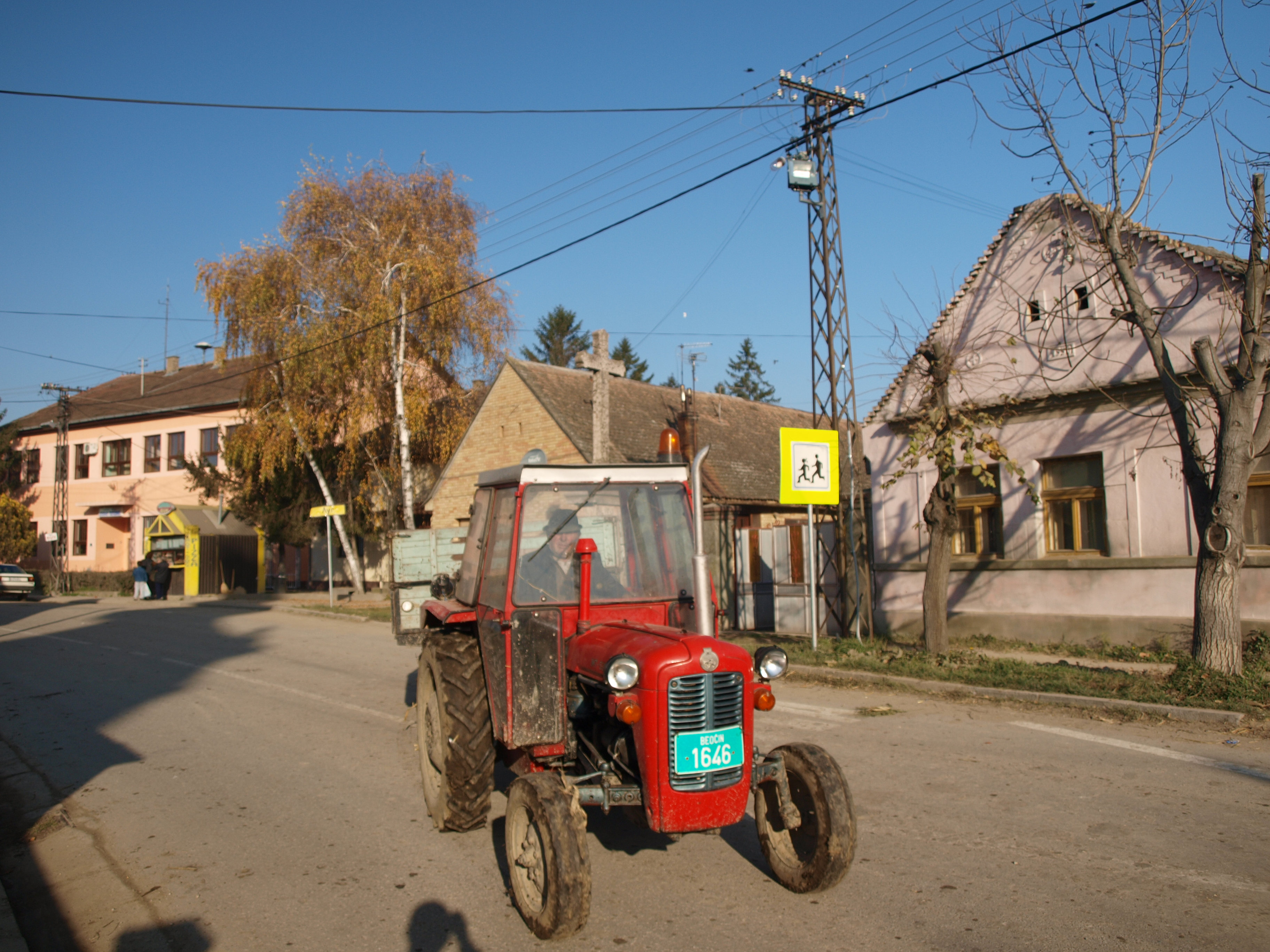 IMT 539. Susek, Srbija.